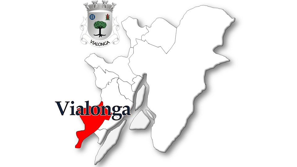 Evolução da População